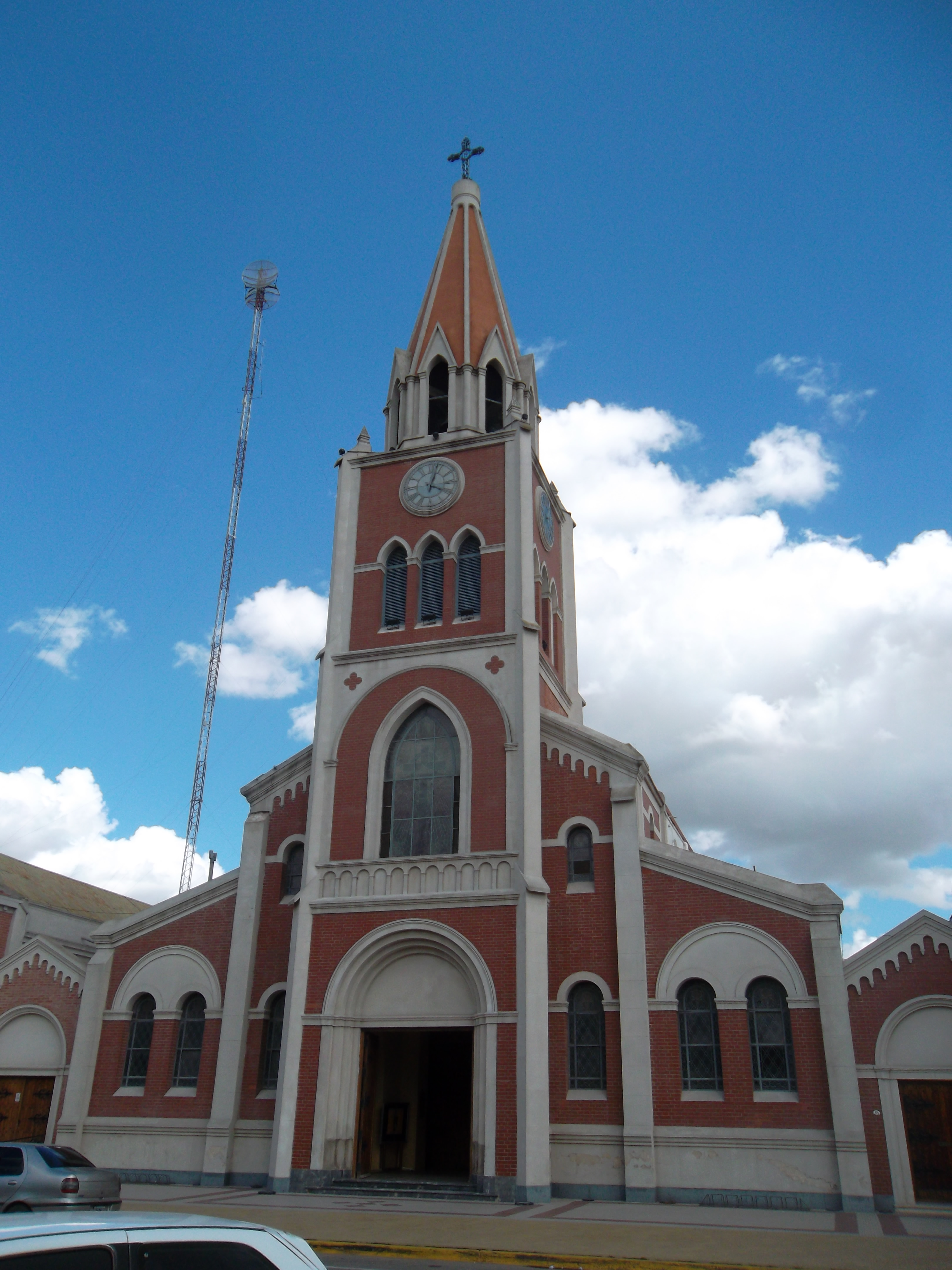 Iglesia Catedral - Santo Domingo de Guzmán de 9 de Julio, Buenos Aires